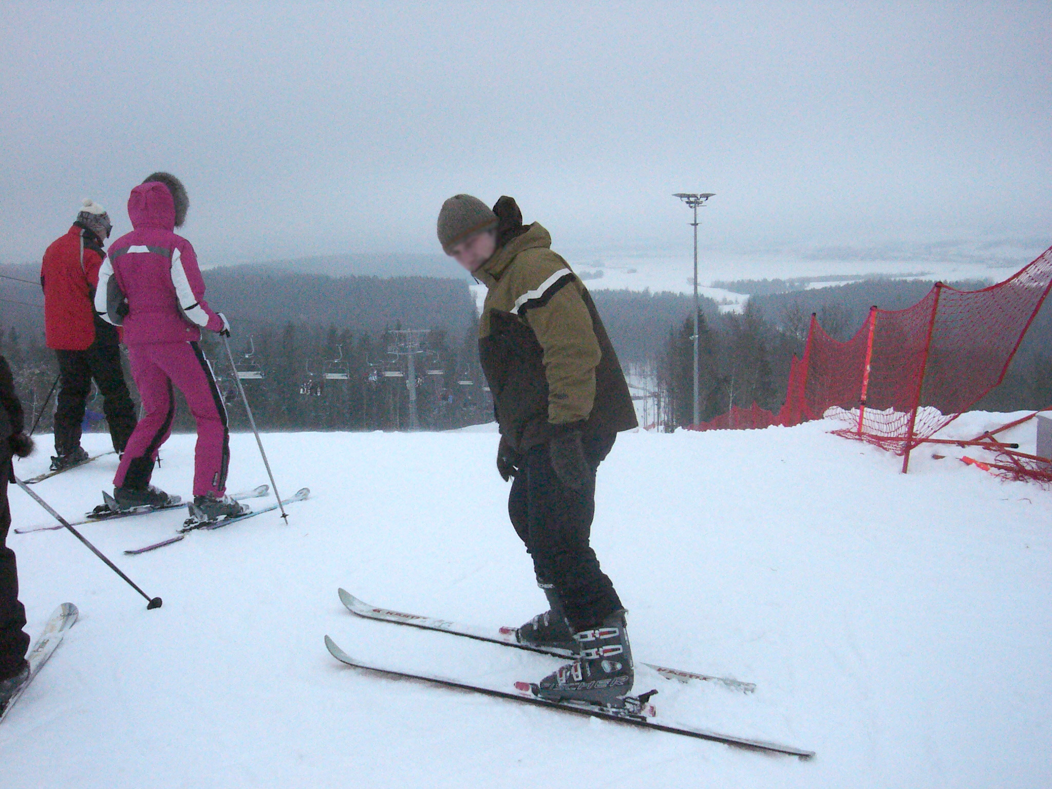 "Silichy" ski resirt in Belarus